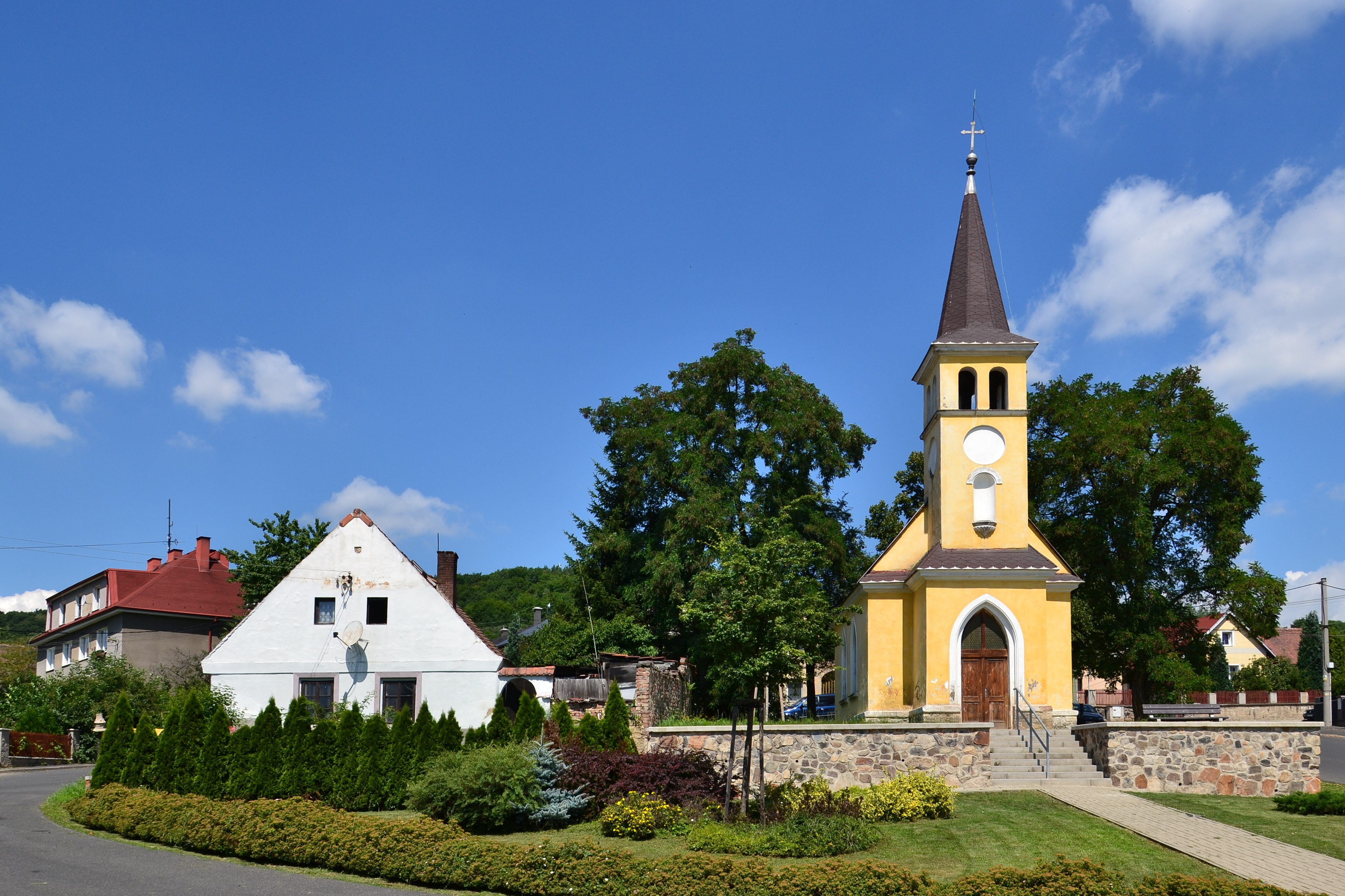 Kaple